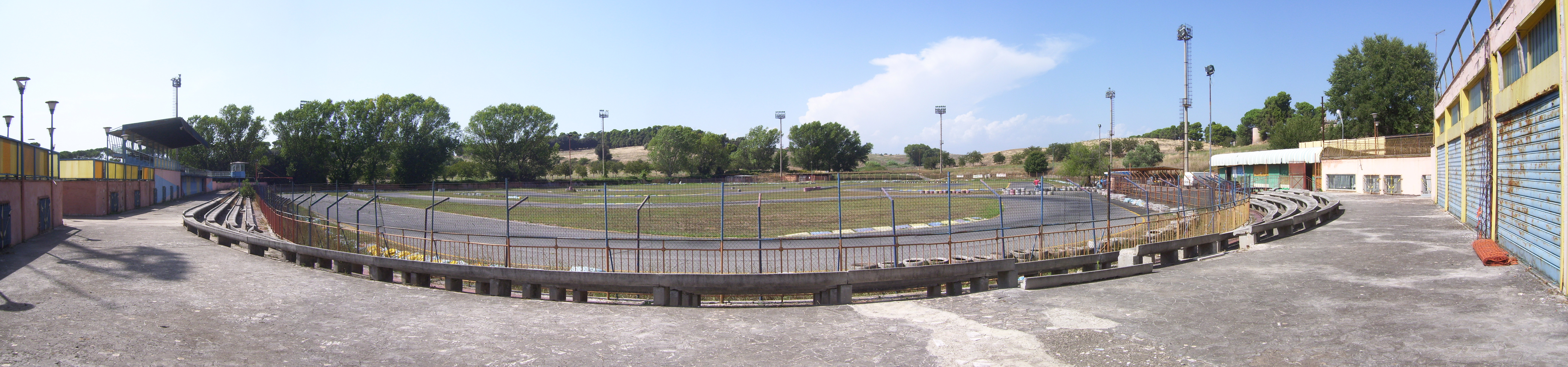 Panoramica del kartodromo Pista d'Oro a Guidonia Montecelio